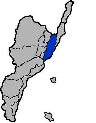 本圖係小籃子為編輯台東縣東河鄉所改繪，感謝KJ提供原圖。